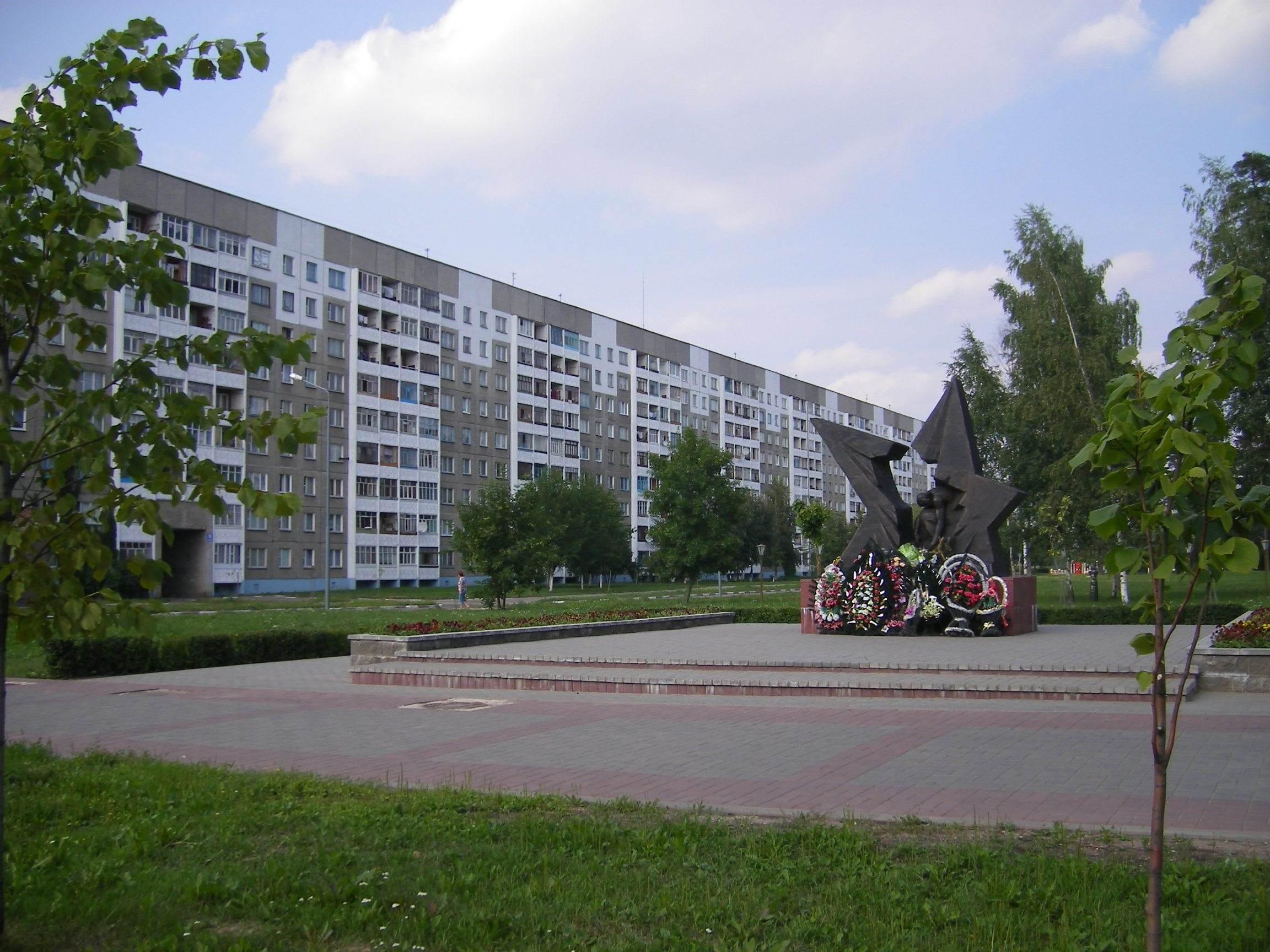 Navapolatsk, Afghanistan War Memorial